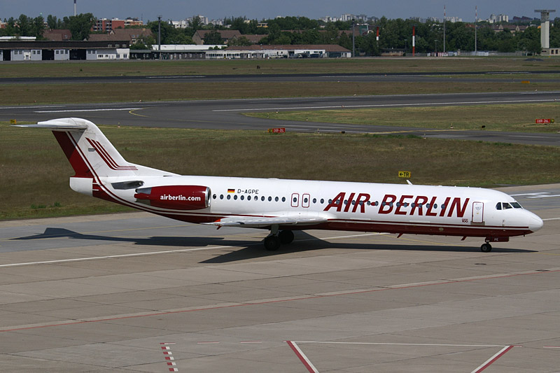 Air Berlin (Germania) Fokker 100 D-AGPE - Berlin-Tegel (TXL/EDDT)